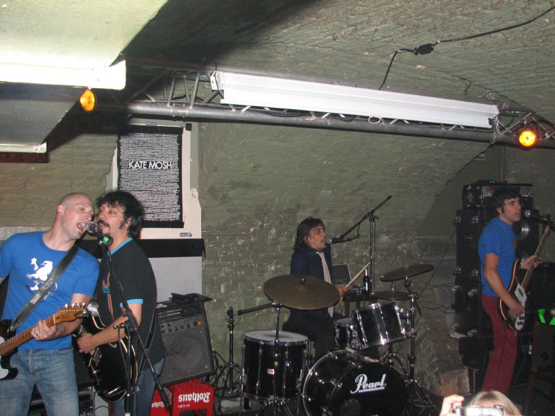 La banda de pop rock argentina, los Super Ratones en 2006.